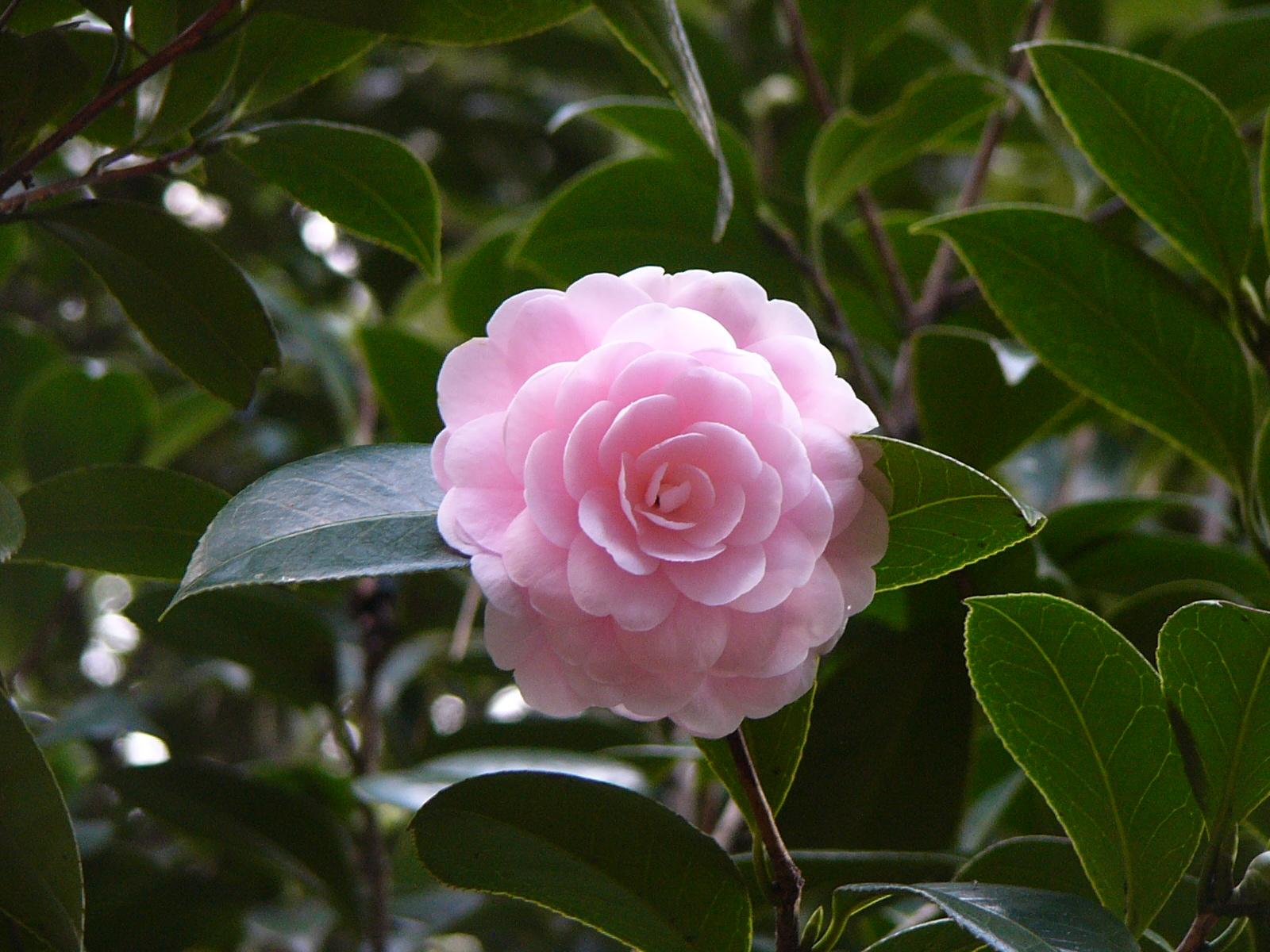 11月20日周辺の木の紅葉が始まる頃にもう開花し出した。バラの様に花弁が多いのが特徴的。